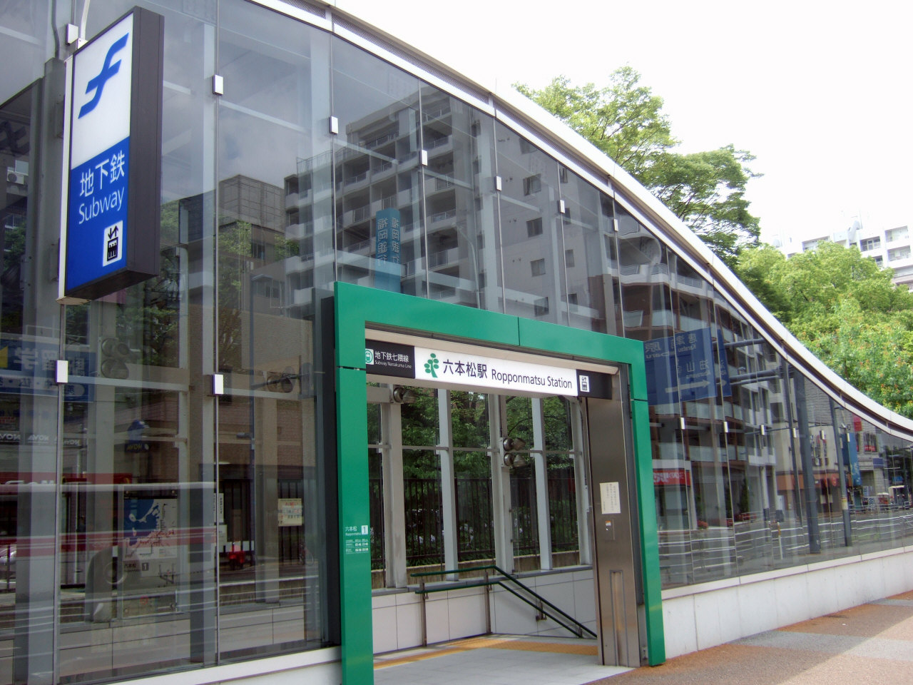 福岡市地下鉄六本松駅（1番出入口）